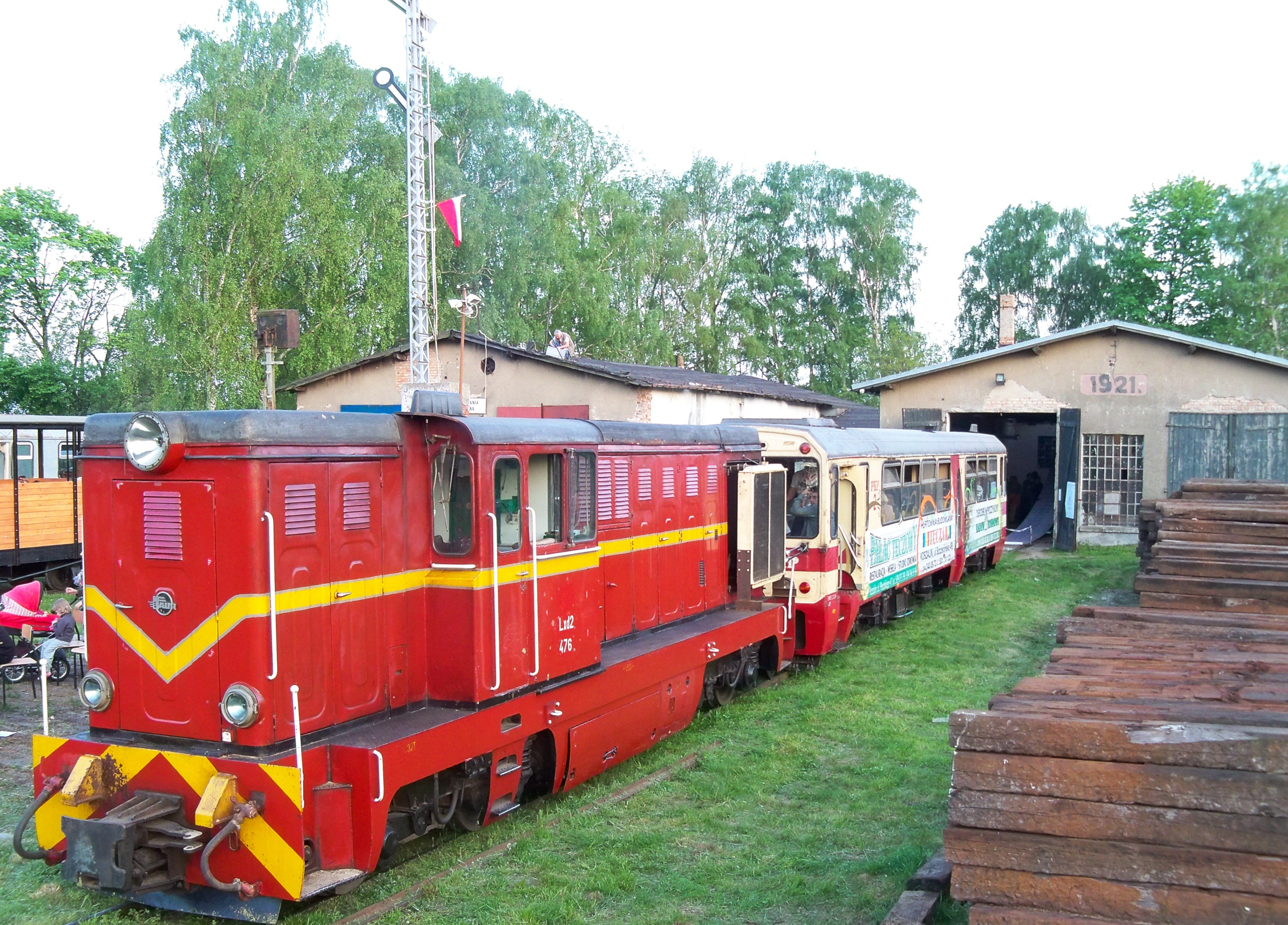 Koszalin wąskotorówka